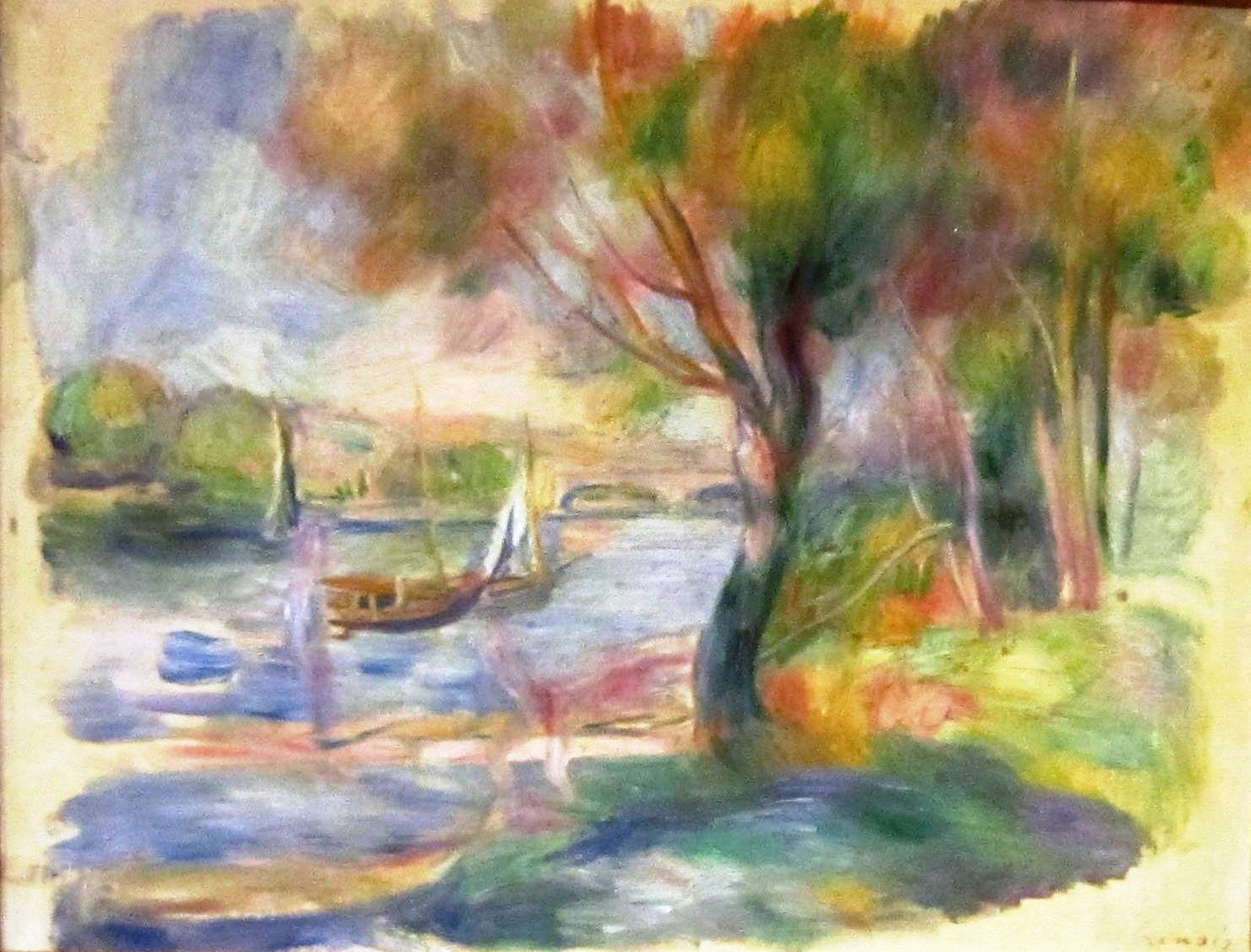 La Seine à Argenteuil par A. Renoir